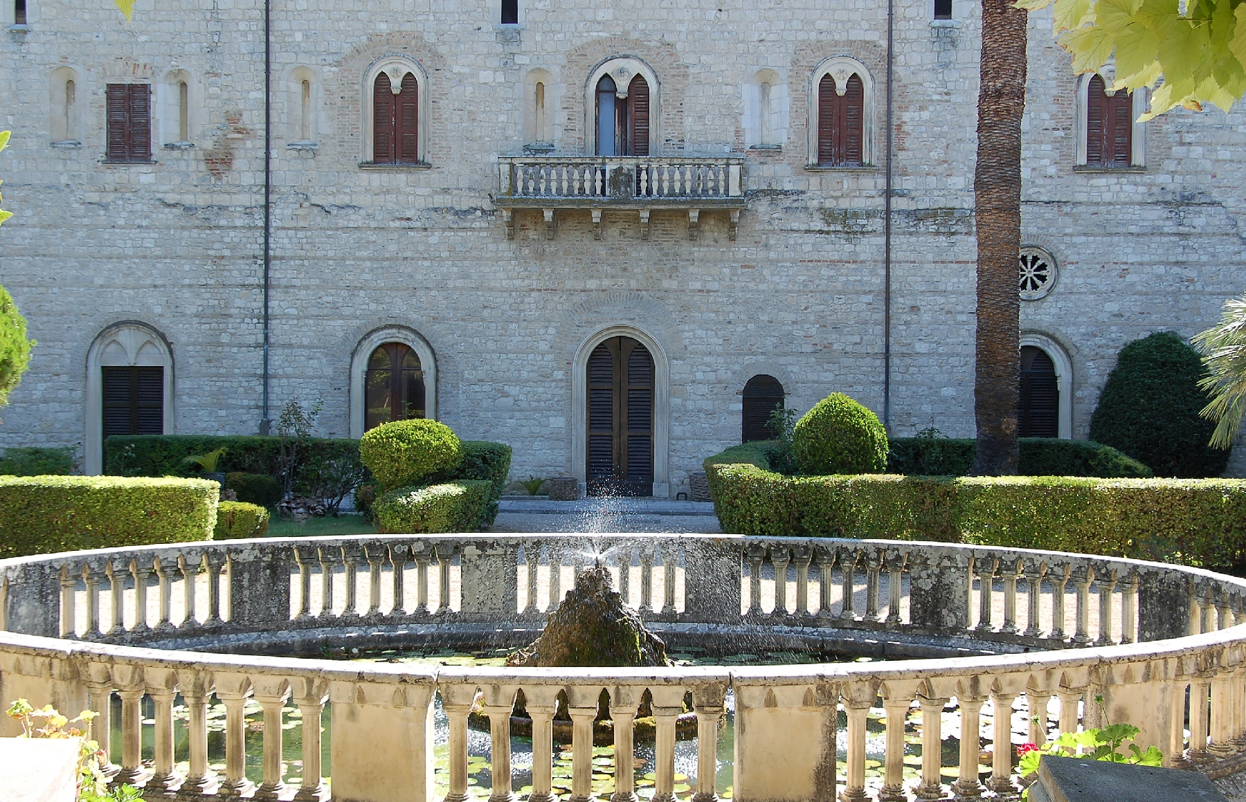 Manopello 2011 Sala Capitolina Santa Maria Arabona